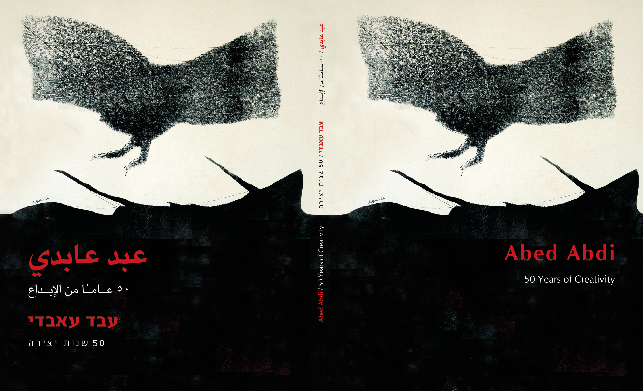 בן צבי, טל, 2010. עבד עאבדי, רטרוספקטיבה, 50 שנות יצירה, הוצאת גלריה לאמנות אום אל פחם עיצוב גרפי: ואיל ואכים